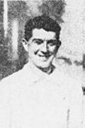 calciatore italiano